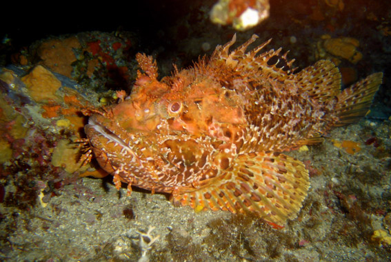 Scorpaena scrofa (Rascasse rouge) (Croatie) (Photo personnelle)